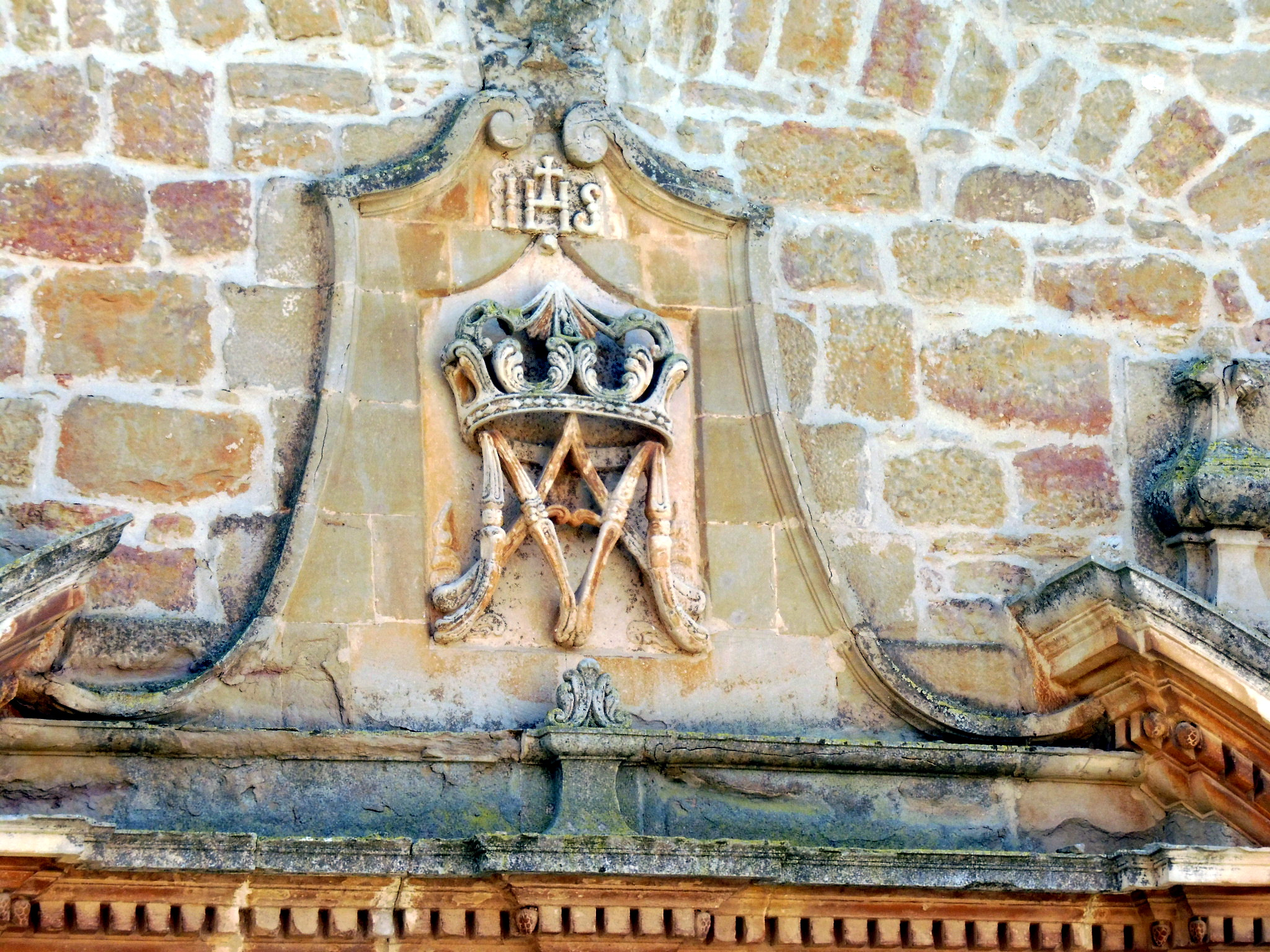 Església parroquial de Santa Maria de Mont-roig (els Plans de Sió): detall del frontó